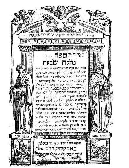 שער הספר "נחלת שבעה", מהדורה ראשונה, אמסטרדם תכ"ז, 1667